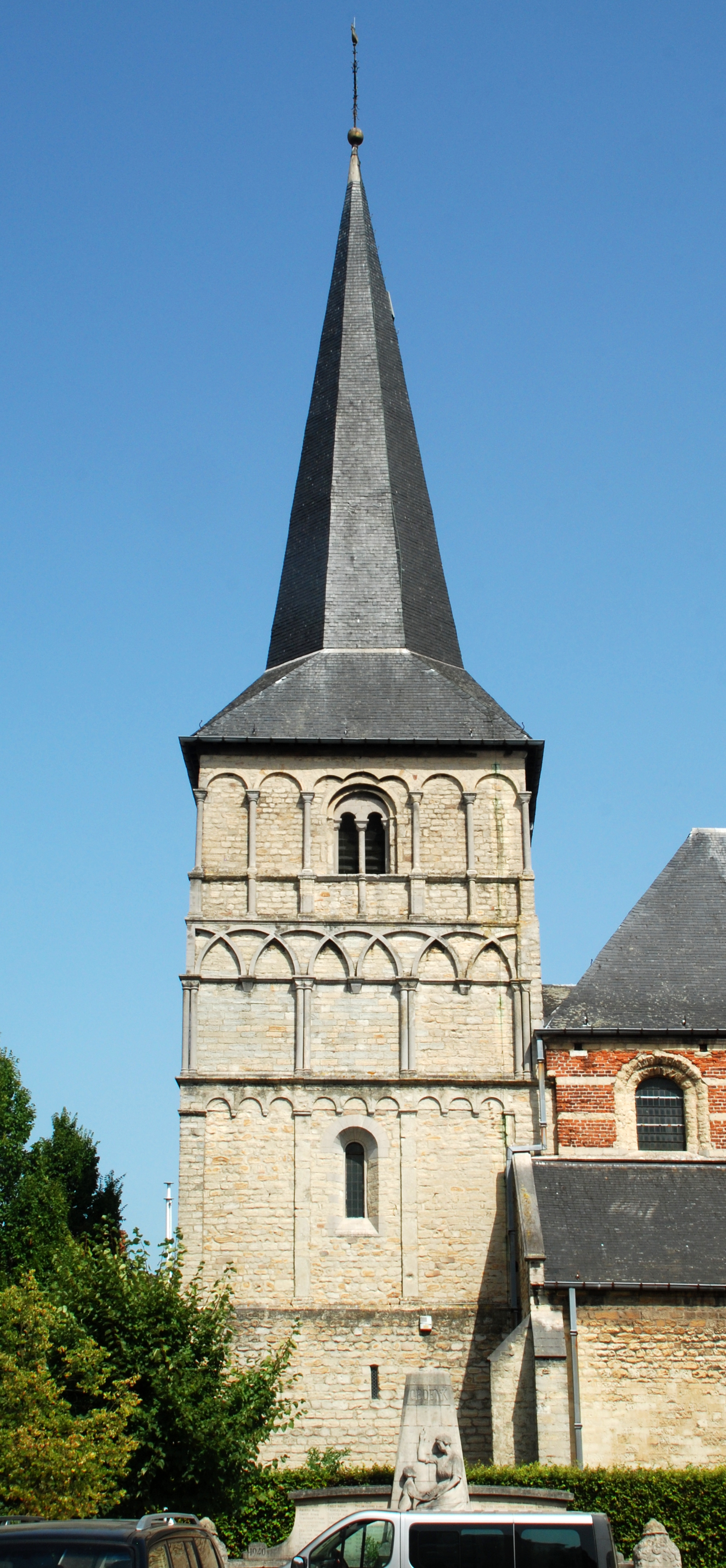 Belgique - Brabant flamand - Église Notre-Dame de Herent